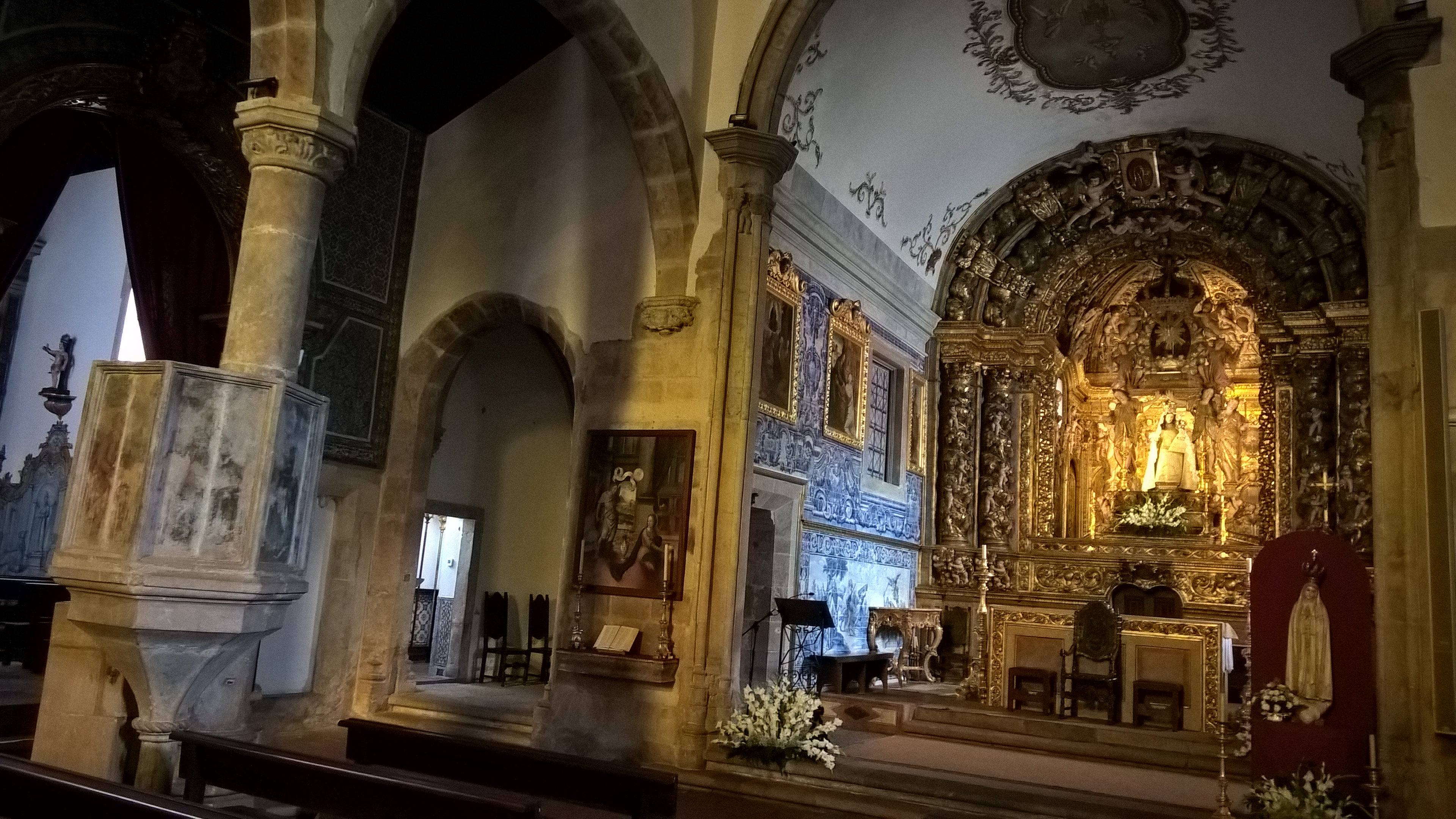 Visão parcial do interior da Igreja Matriz de Arruda dos Vinhos